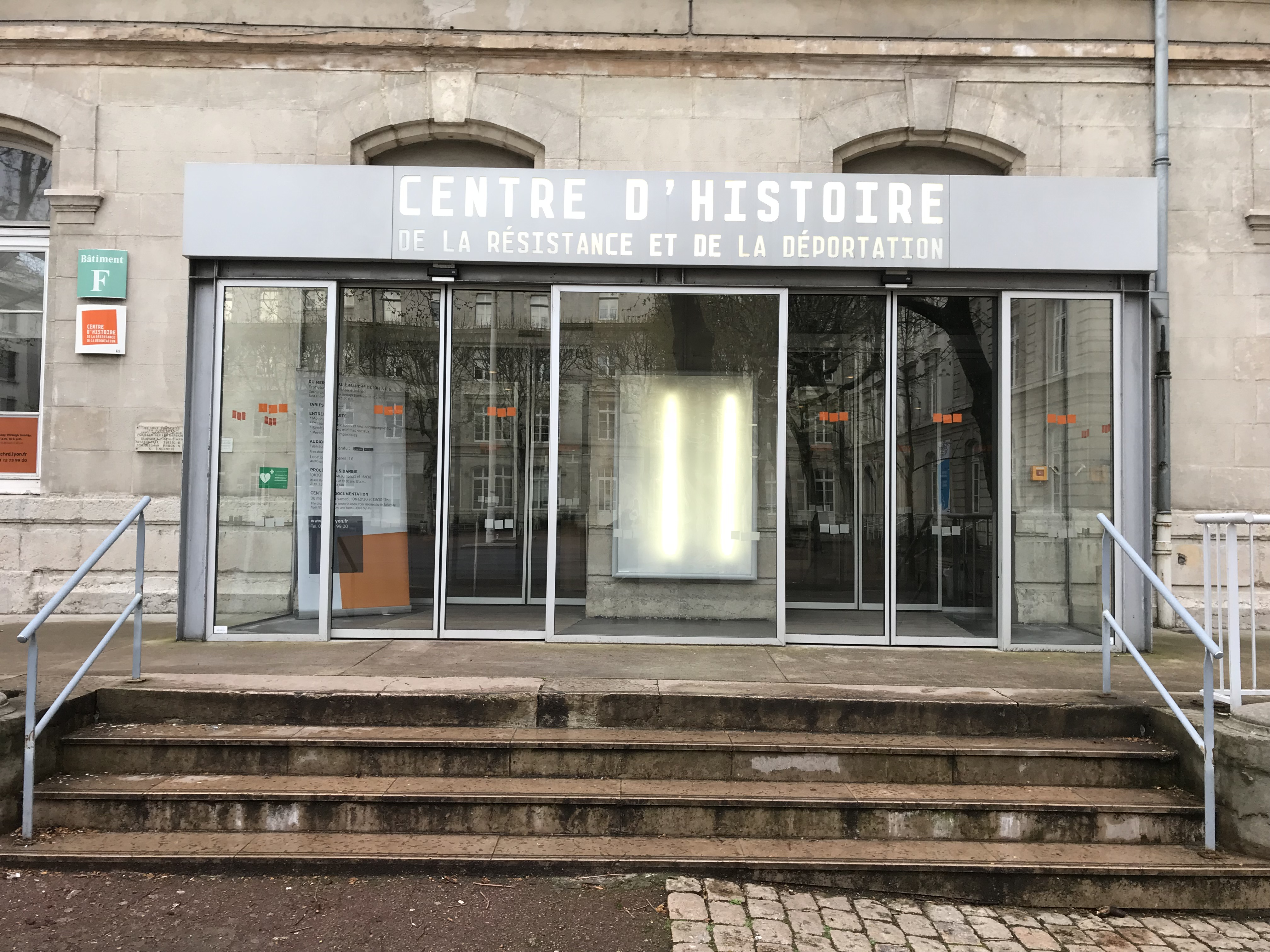 Centre d'histoire de la résistance et de la déportation à Lyon.